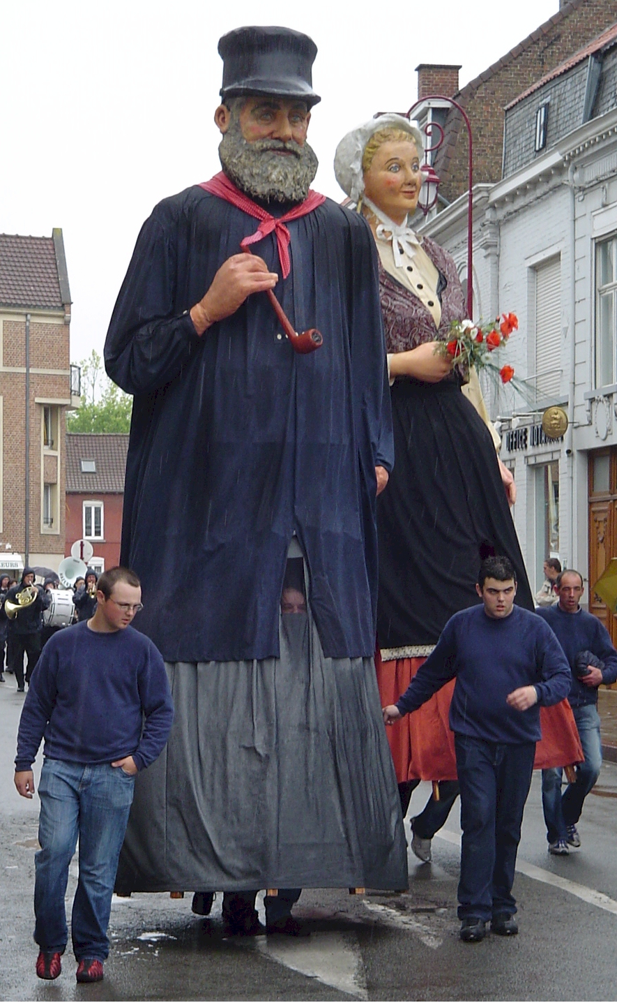 Tisje Tasje giant from Hazebrouck